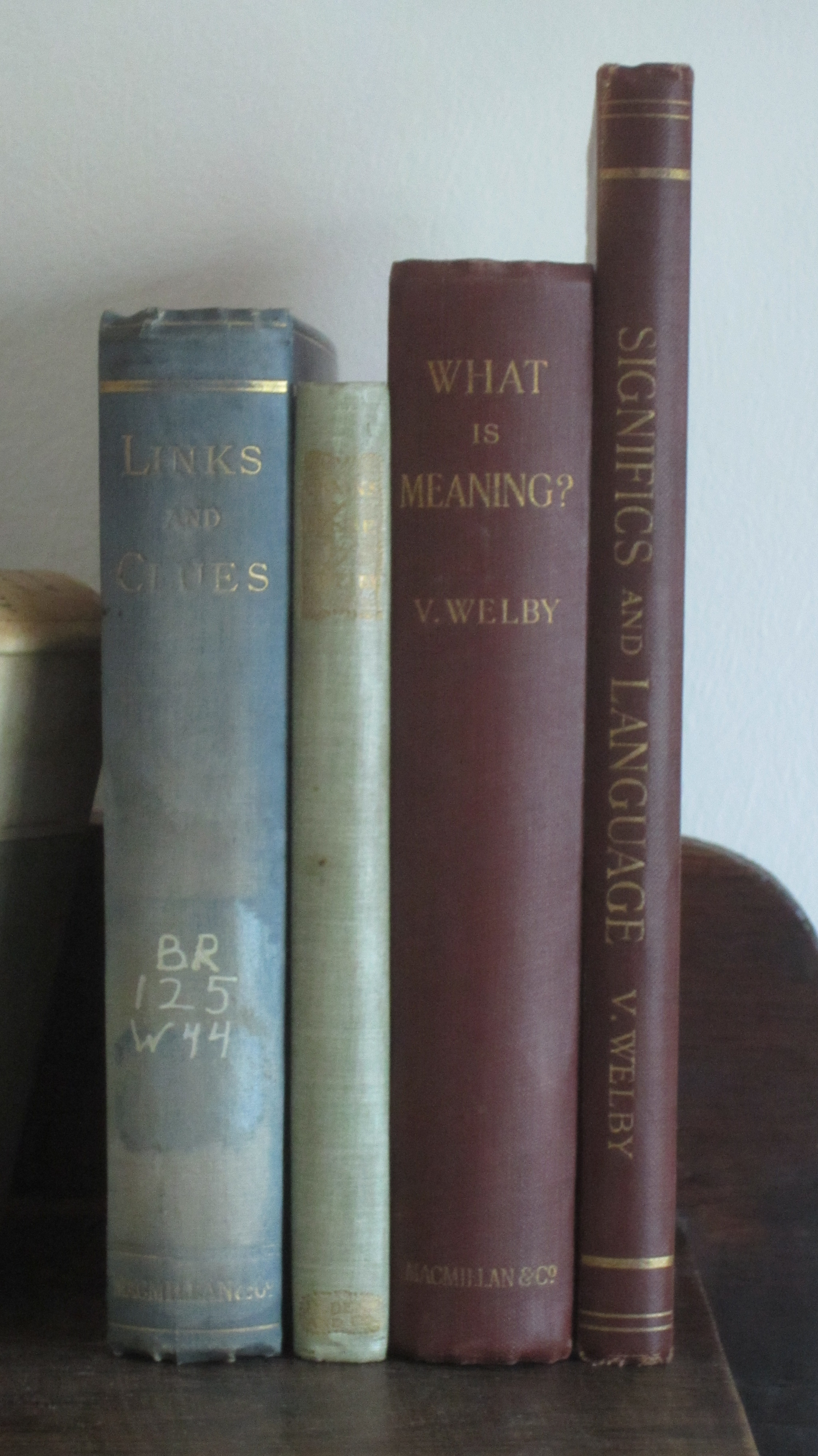 Eerste uitgaven van werk van Victoria Welby, te weten: Links and Clues (Macmillan, 1881), Grains of Sense (J.M. Dent, 1897), What is Meaning? Studies in the Development of Significance (Macmillan, 1903) en Significs and Language. The Articulate Form of Our Expressive and Interpretive Resources (Macmillan, 1911).